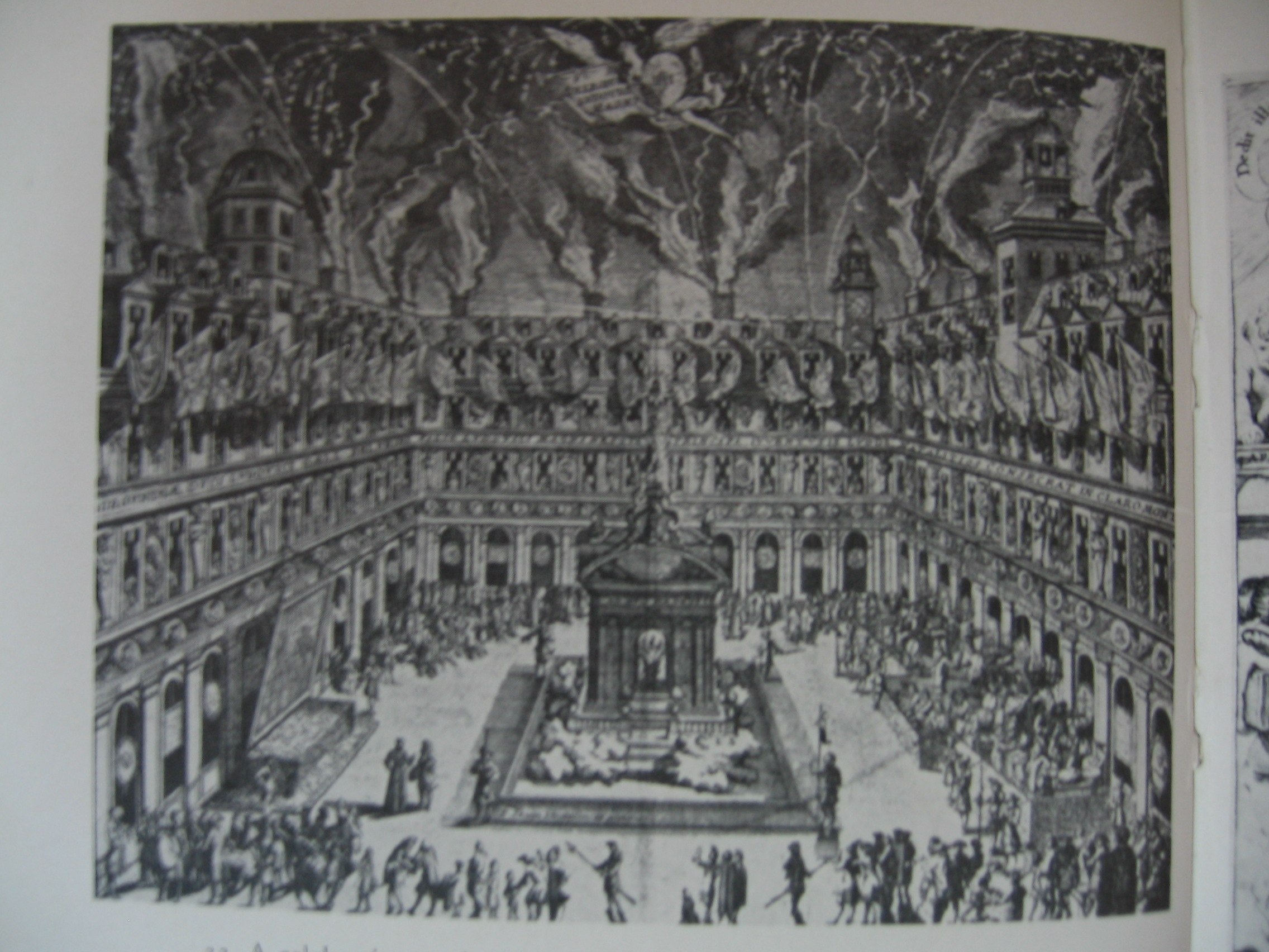 Grande représentation théâtrale au collège jésuite de Clermont (France) à l'occasion de l'anniversaire du roi Louis XIII.